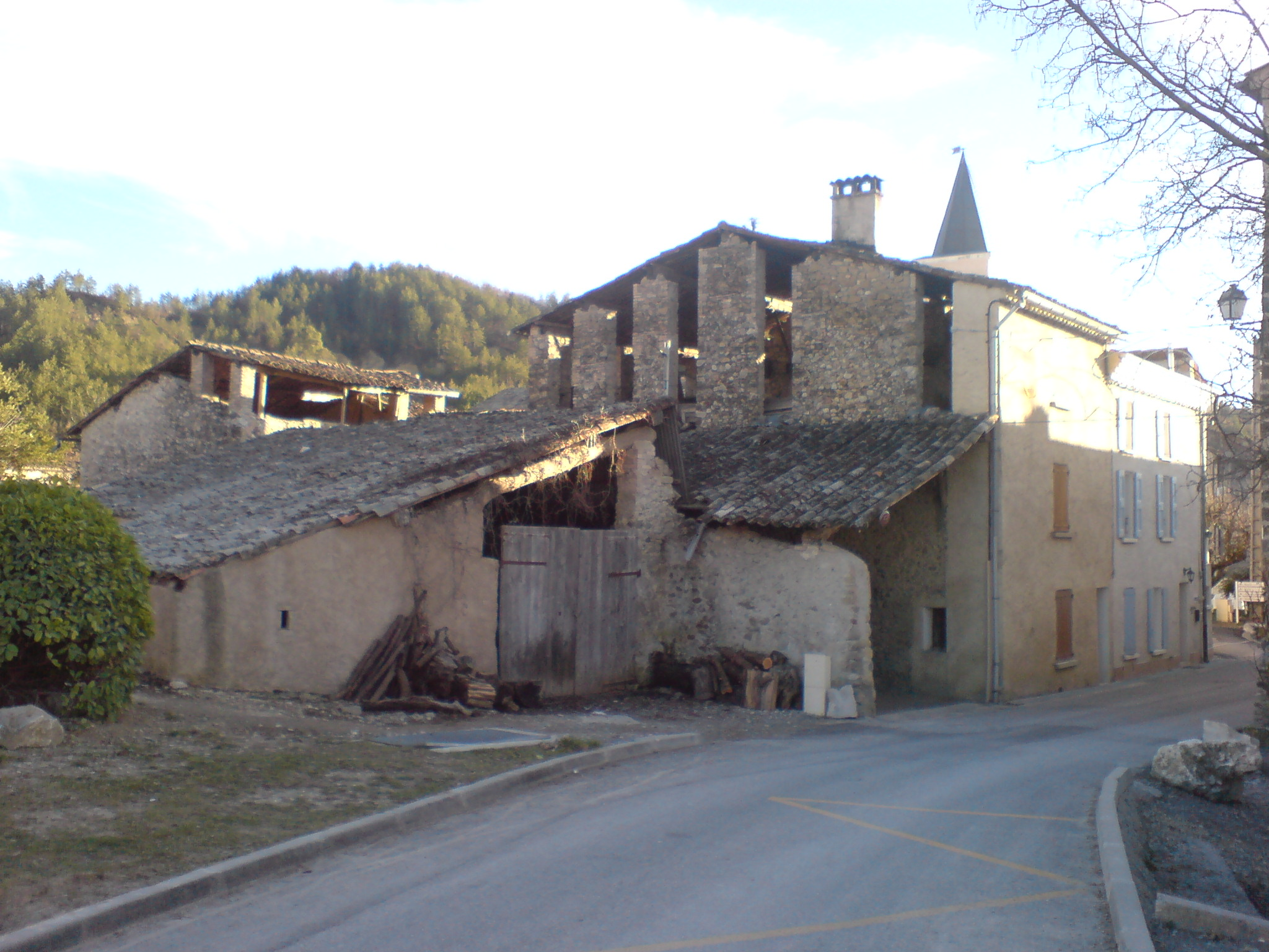 Grange au village du Chaffaut, présentant des jours verticaux dans le mur, destinés probablement à la ventilation du local. Ce type de construction est typique du centre du département des Alpes-de-Haute-Provence